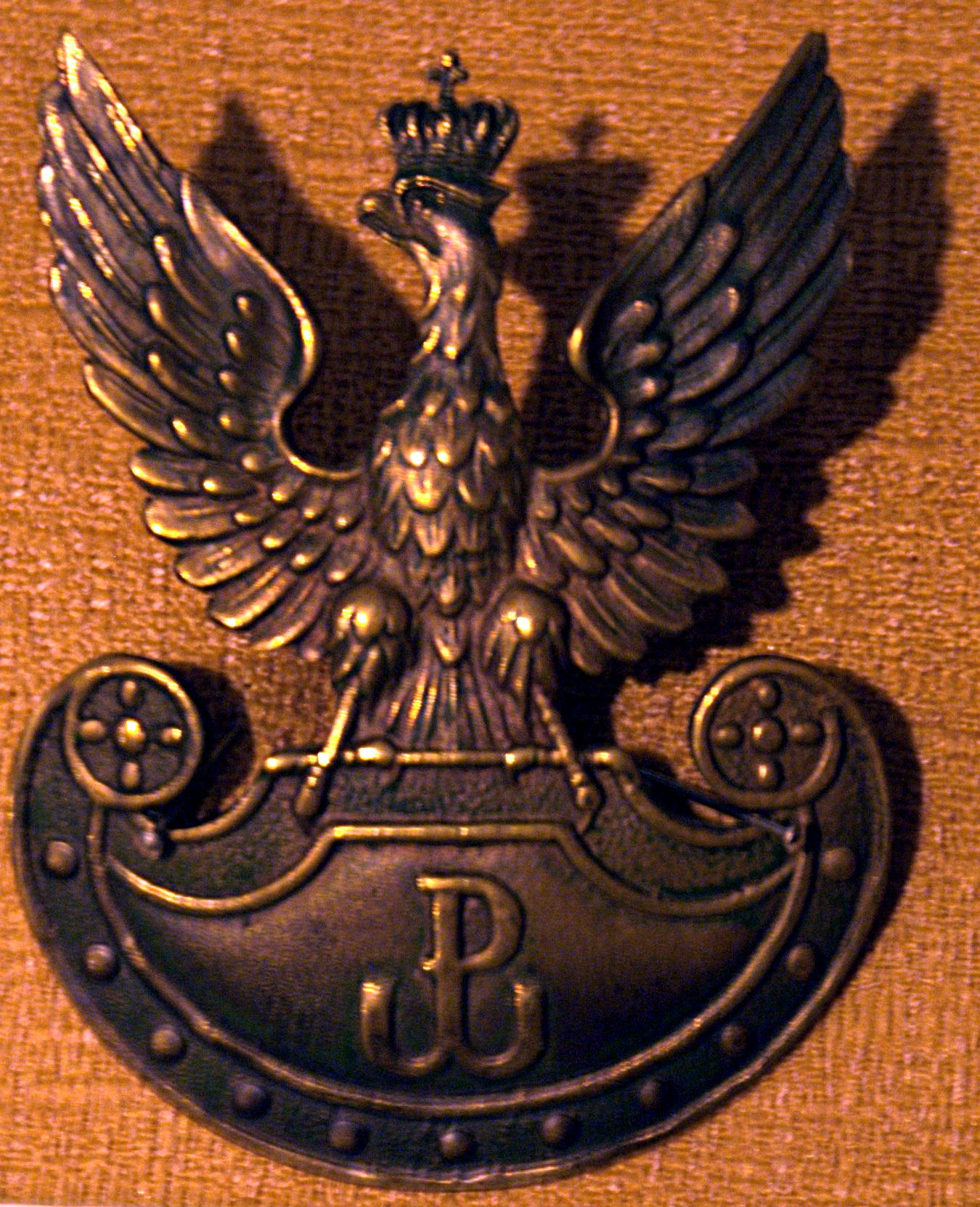 Mosiężny orzełek Armii Krajowej, bity w latach 1942-45, ze zbiorów Muzeum Hymnu Narodowego w Będominie.